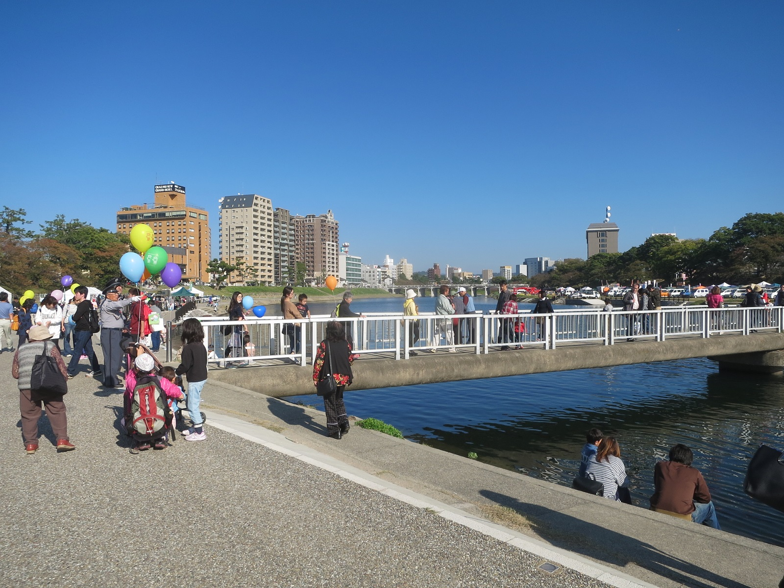 岡崎市 潜水橋